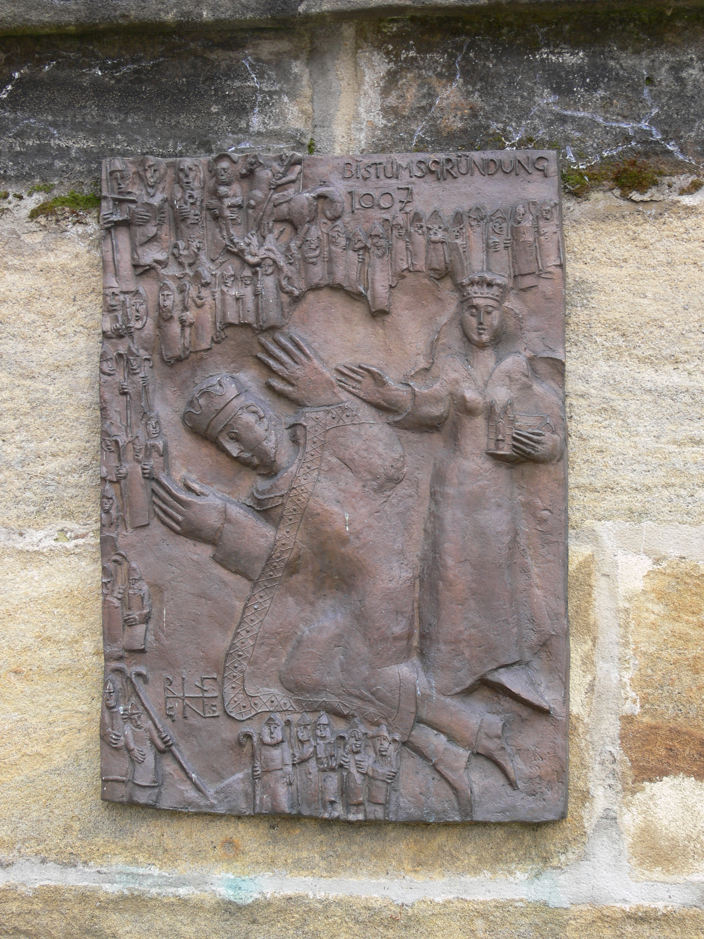 Bamberg, Domberg: "1000 Jahre Bistum Bamberg", Reliefs von Heinrich Schreiber, Kronach